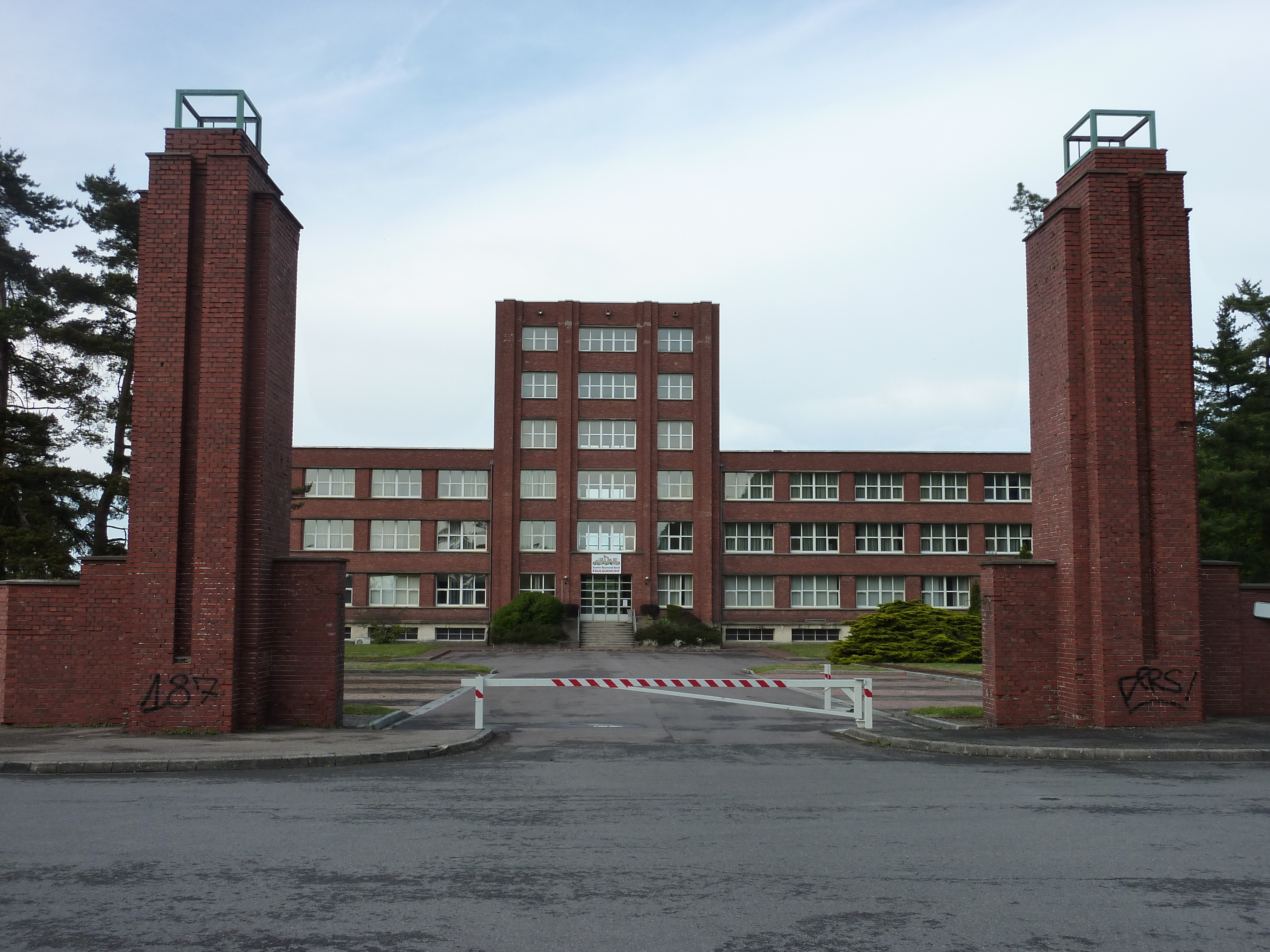 siege de Faulquemont mine de charbon